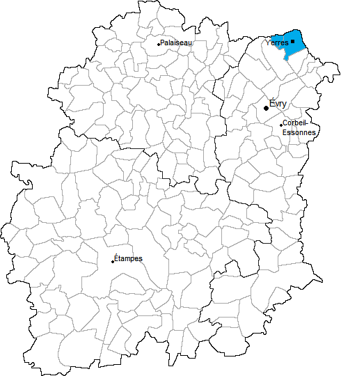 Carte de localisation du canton d'Yerres en Essonne (91)